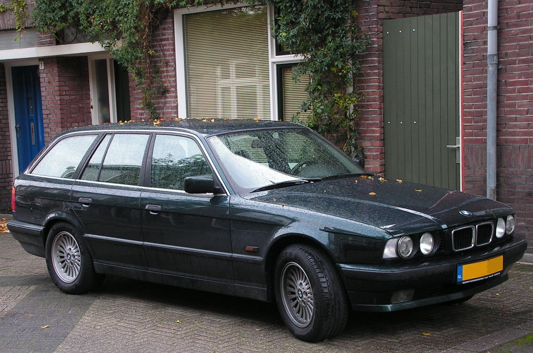 BMW 520i touring 1995. gefotografeerd in 2006